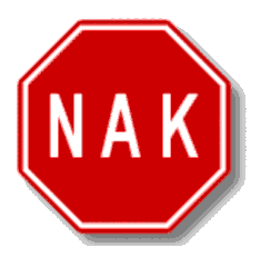 Tartu NAK-i märk